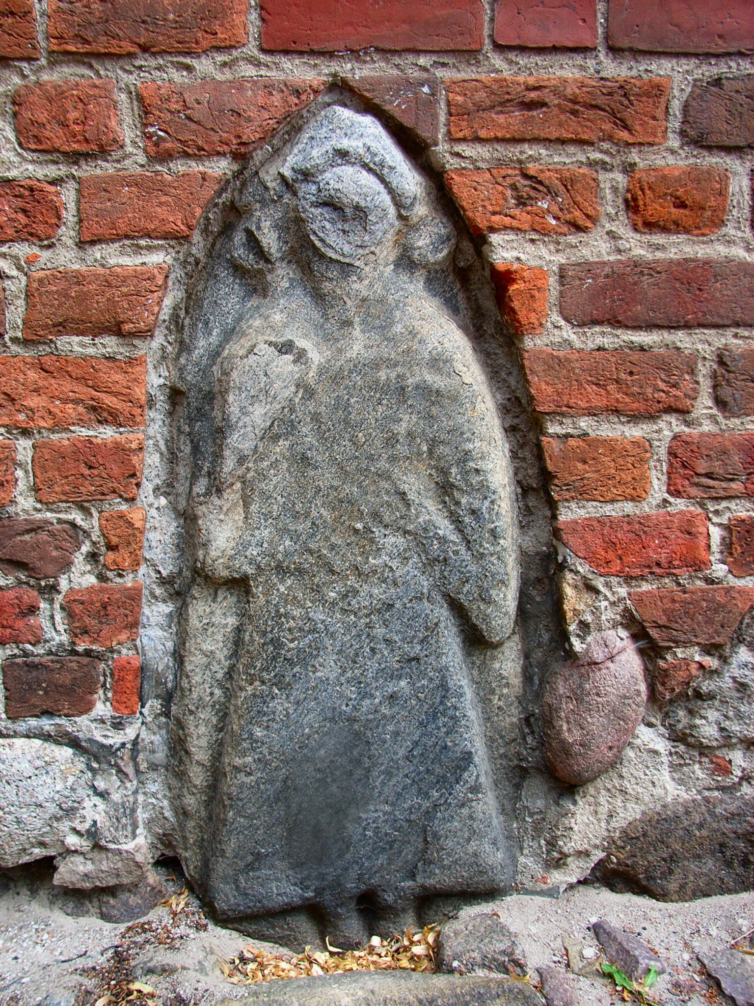 Bildstein in der Westfassade der St. Marienkirche in Bergen auf Rügen. Alter, Herkunft und Bedeutung sind umstritten. Es ist anzunehmen, dass es sich entweder um den Grabstein des Fürsten Jaromar I. († um 1218) oder, ähnlich dem Svantevit-Stein in der Kirche von Altenkirchen auf der Halbinsel Wittow, eher um das Abbild eines Priesters des slawischen Svantevit-Tempels am Kap Arkona aus der Zeit vor 1168 handelt. Der Stein ist offenbar nachträglich bearbeitet worden: Dort, wo die Figur auf dem Svantevit-Stein von Altenkirchen ein großes Trinkhorn trägt, ist hier (bei einer Ansicht von der Seite) in einer breiten Vertiefung die Andeutung eines Kreuzes zu erkennen.